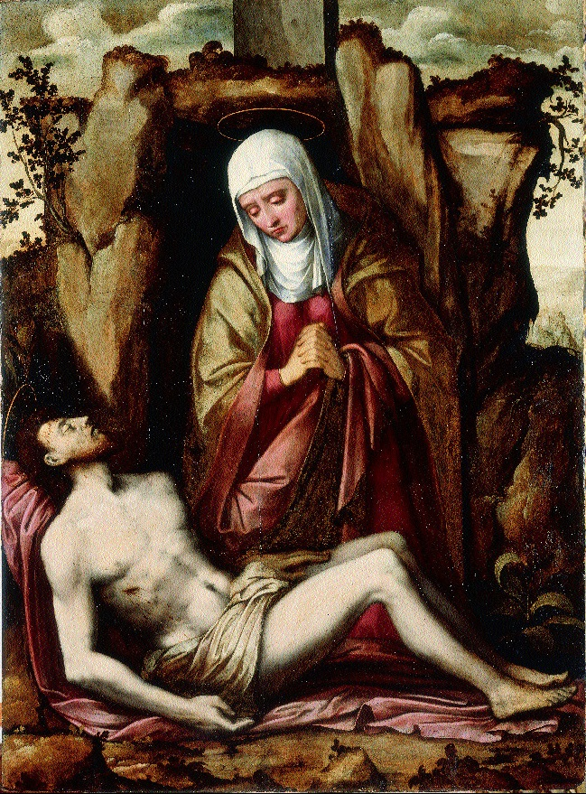 La obra representa a Jesucristo muerto y situado a los pies de su madre, la Virgen María.